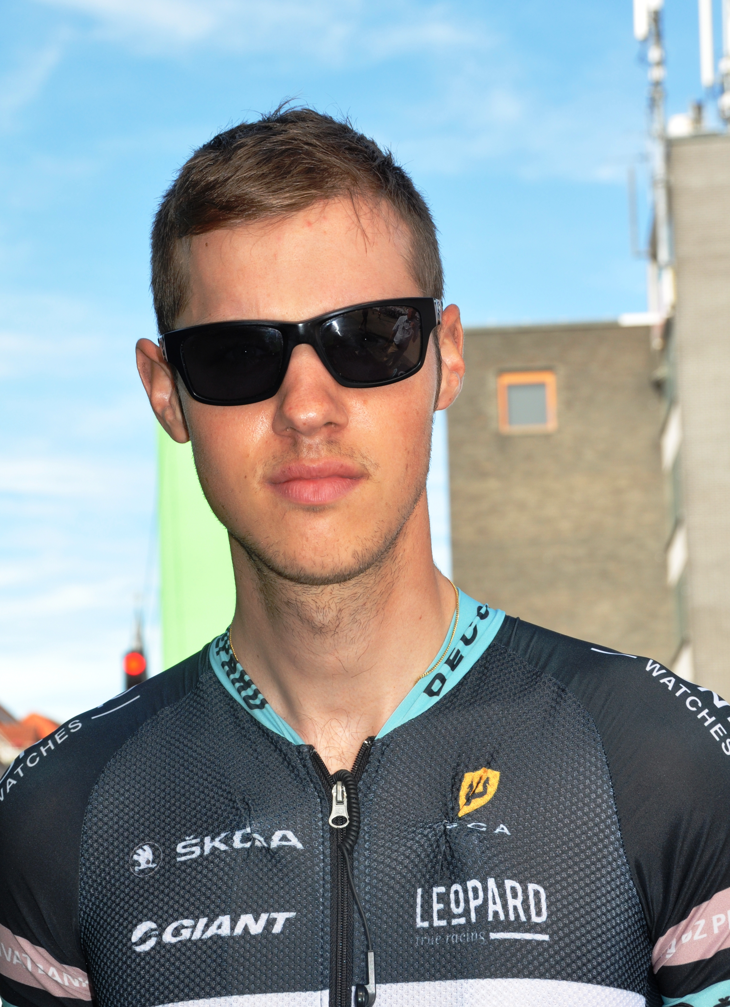 Gaëtan Pons, luxemburgischer Radrennfahrer